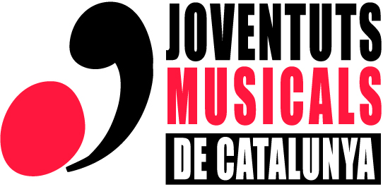 Logotip de Joventuts Musicals de Catalunya